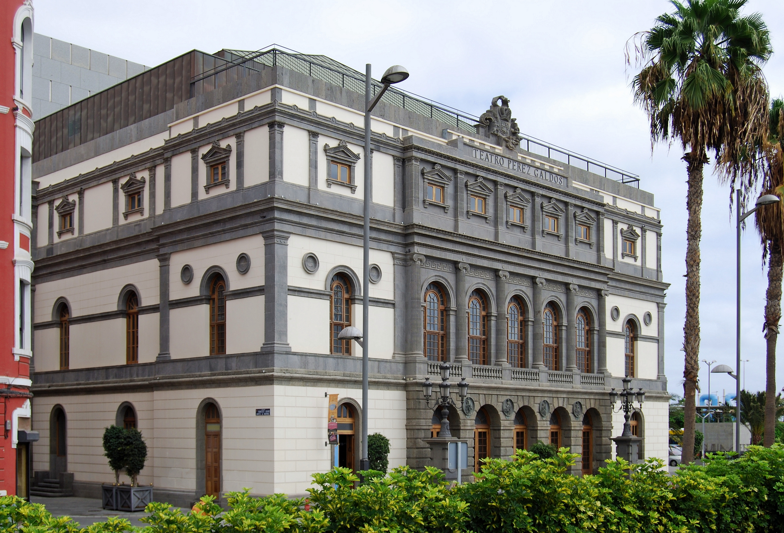 Teatro Pérez Galdós, bedeutendstes Theater von las Palmas de Gran Canaria